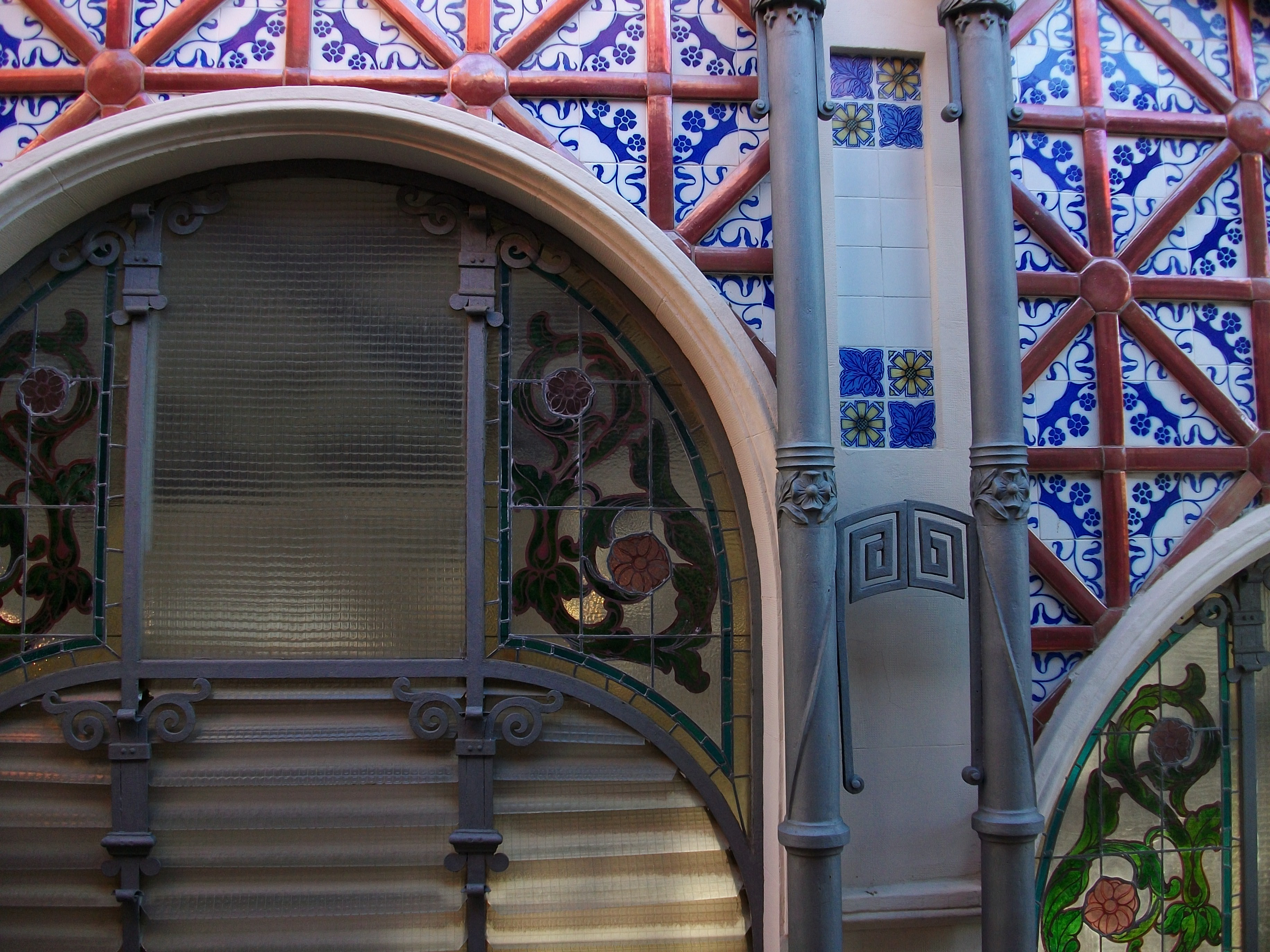 Detall de l'exterior del Mercat Central de València.